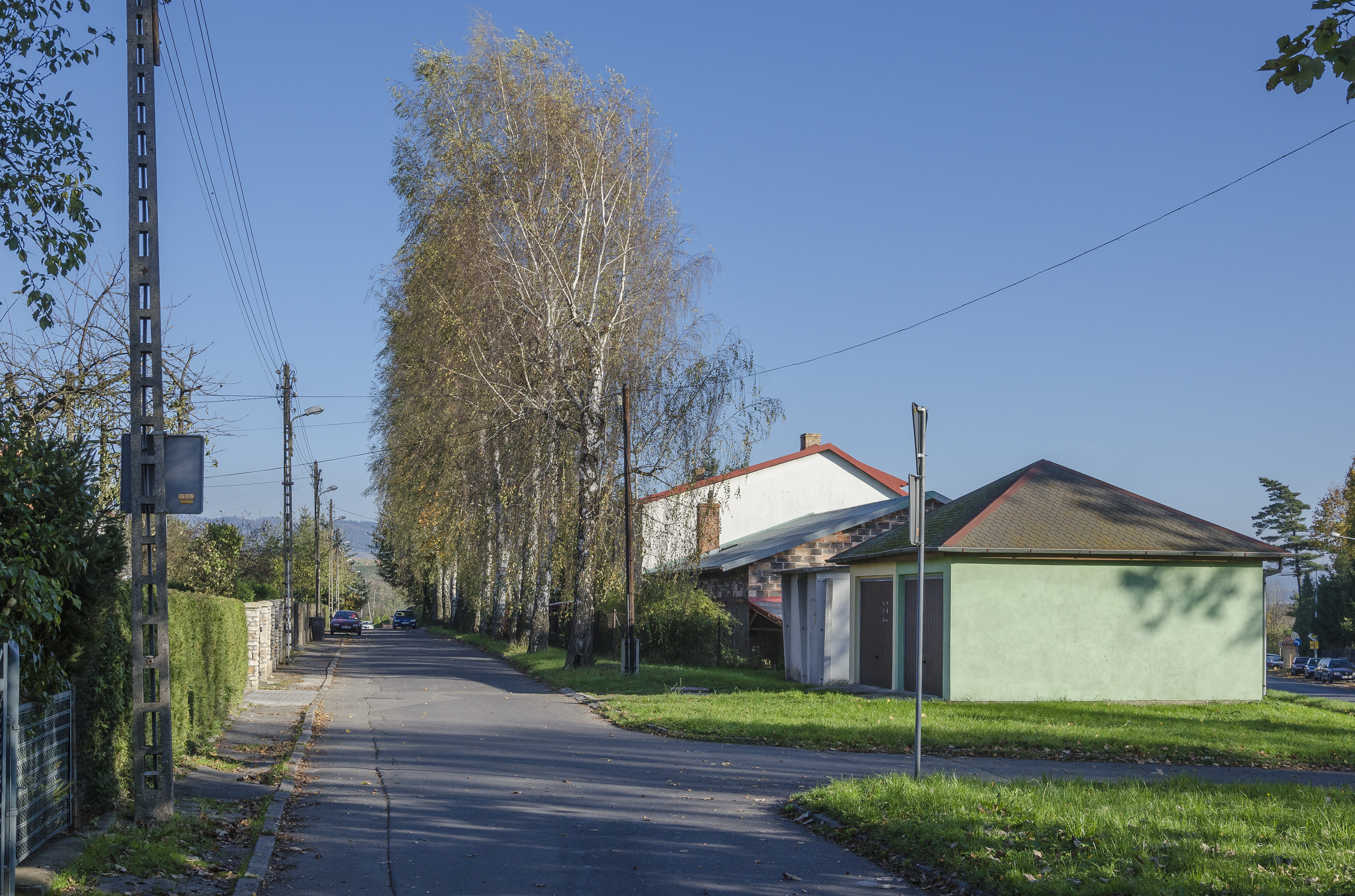 Kłodzko, ul. Drzymały